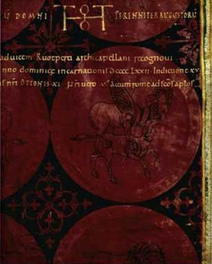 Detail einer Signumzeile mit Monogramm aus der Heiratsurkunde der Kaiserin Theophanu (Niedersächsisches Staatsarchiv 6 Urk. 11)